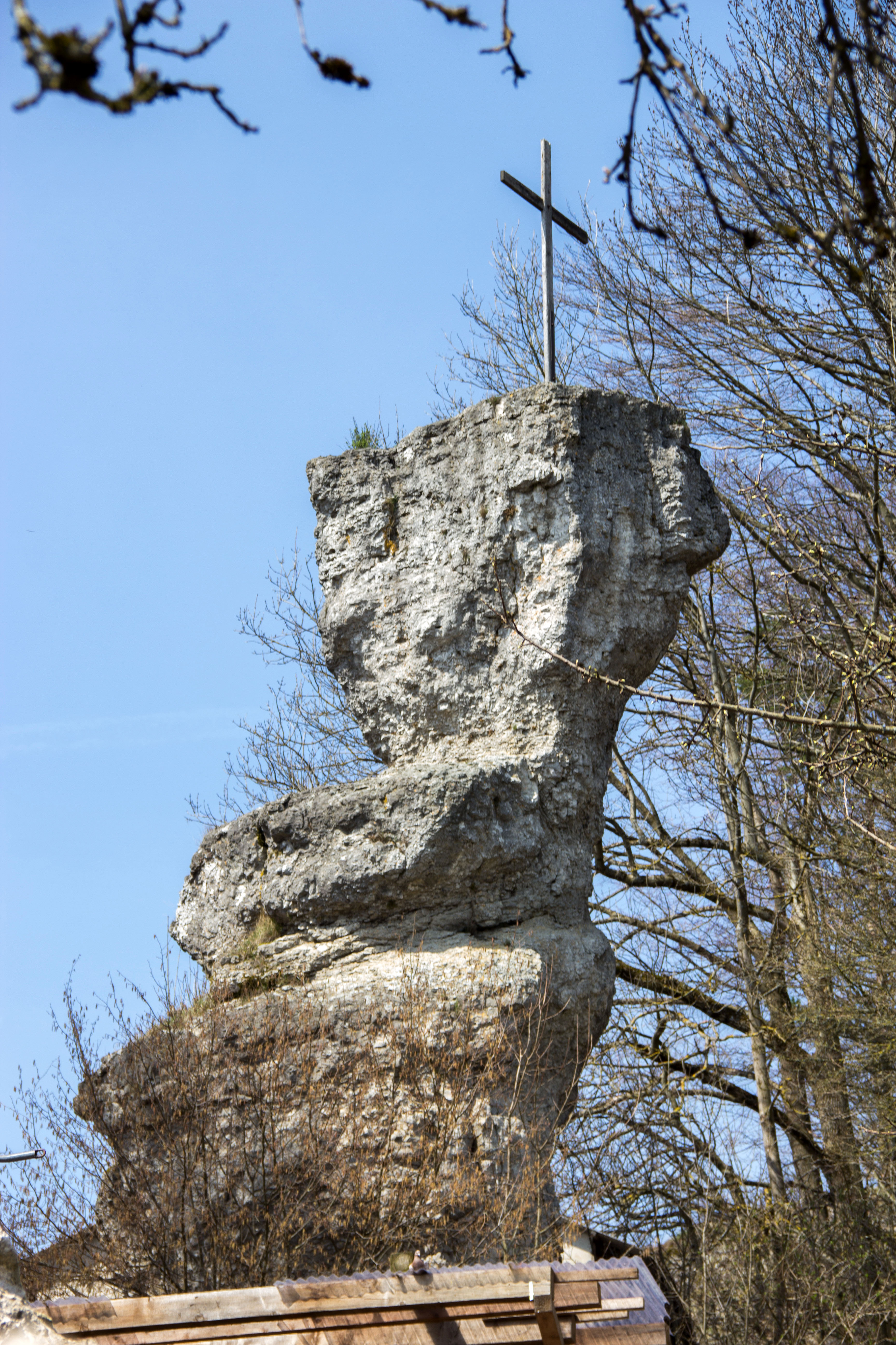 Der Breitenstein (Fels)